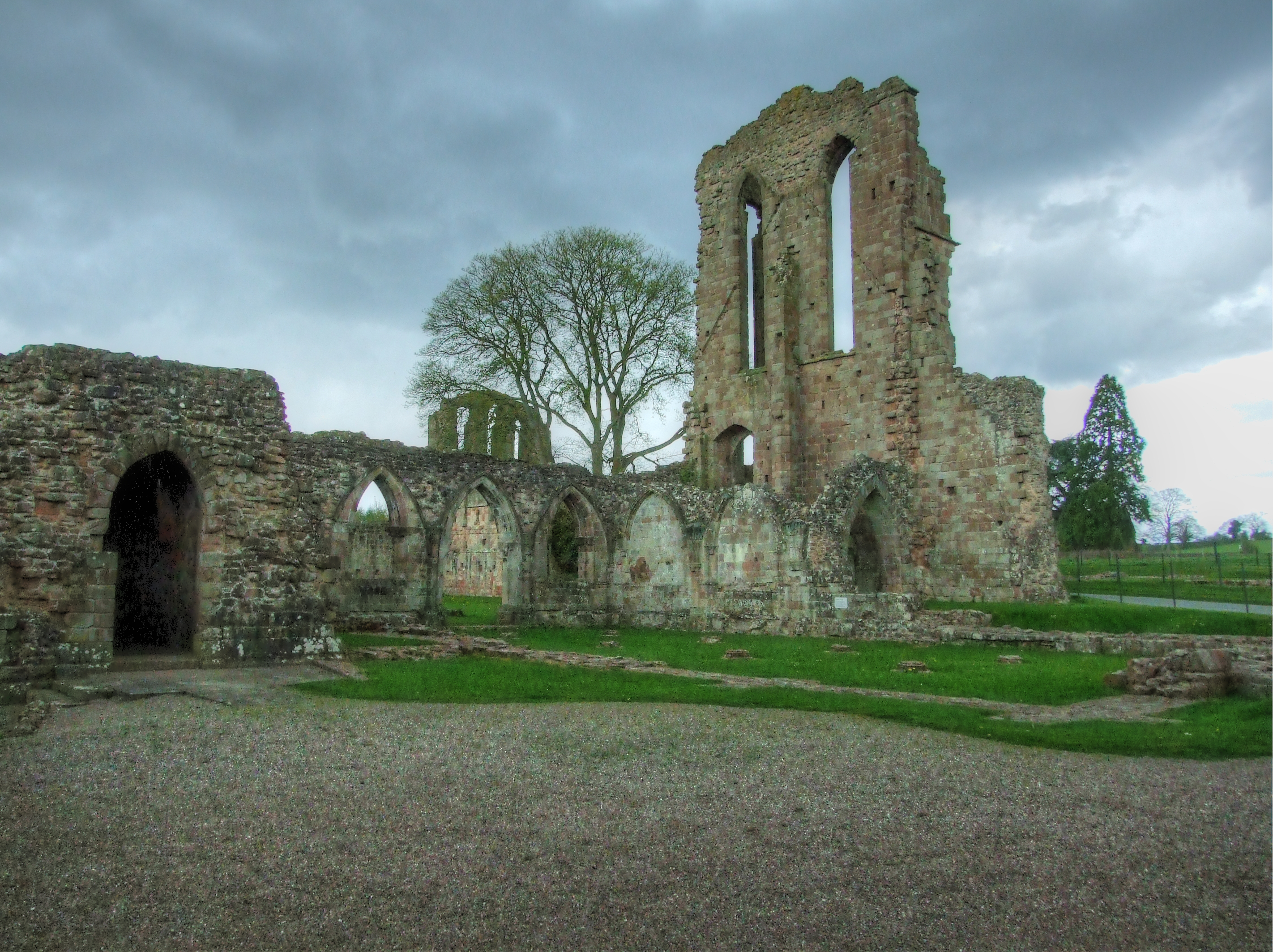 x-abbey4.jpg